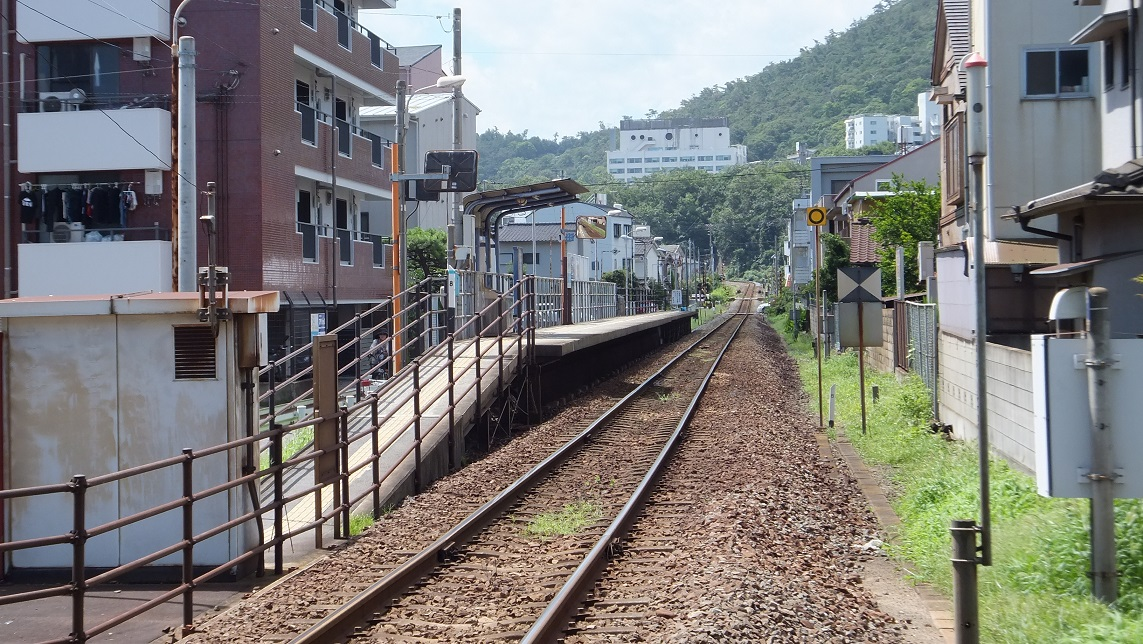 高松市昭和町二丁目 JR四国高徳線 昭和町駅 高松駅方より